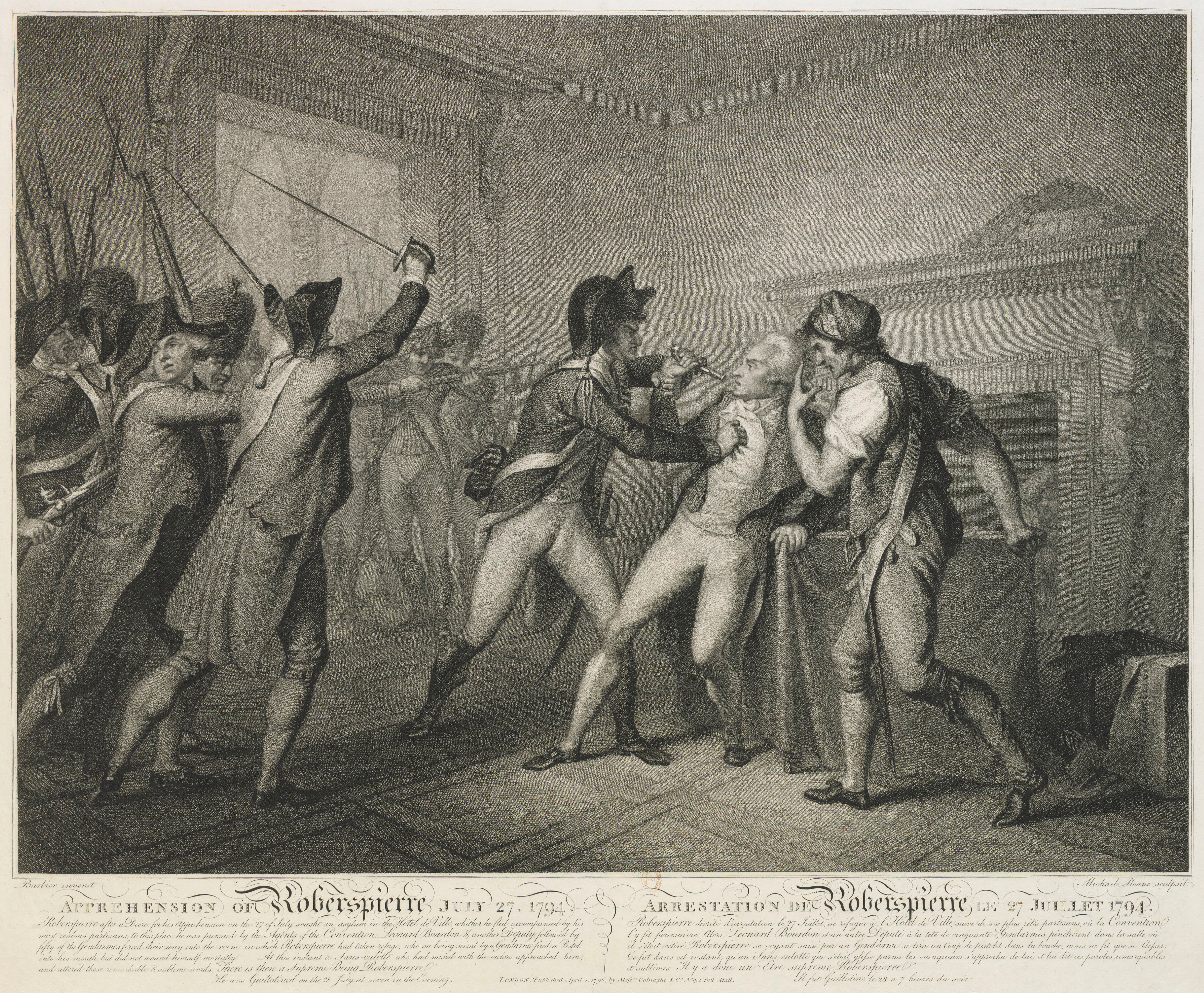 Arrestation de Robespierre le 27 juillet 1794.